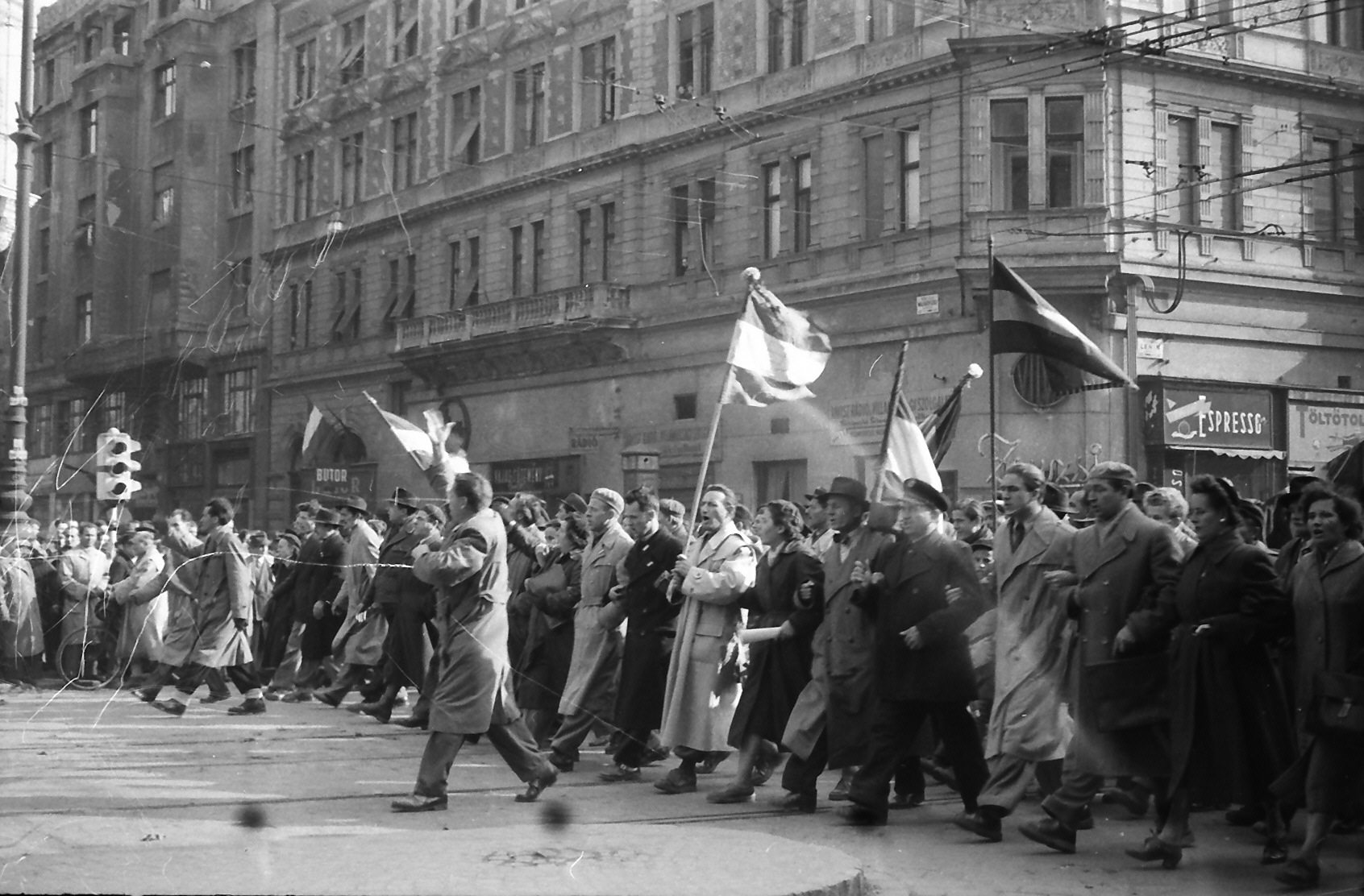 Erzsébet (Lenin) körút - Király (Majakovszkíj) utca sarok. Location: Hungary, Budapest VII. Tags: flag, mass, strike, Budapest, revolution Title: Erzsébet (Lenin) körút - Király (Majakovszkíj) utca sarok.